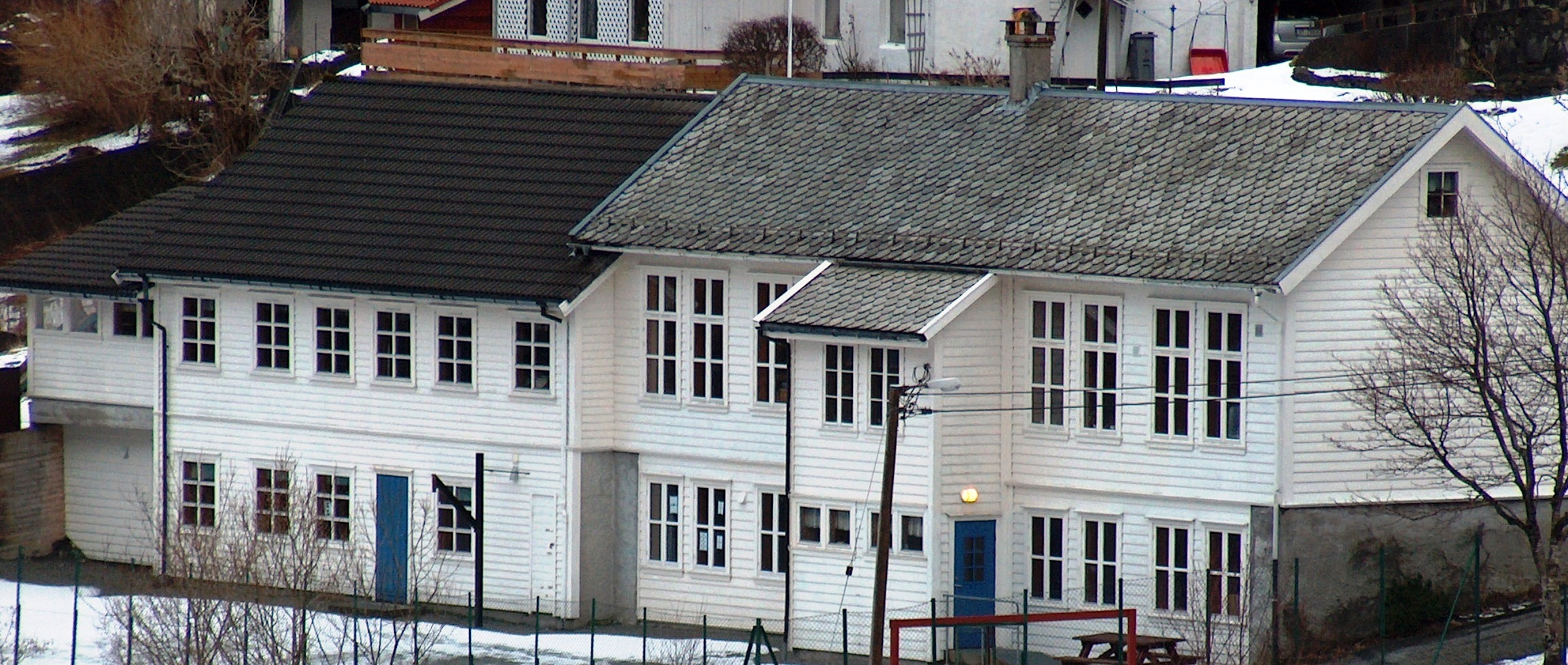 Trengereid skule